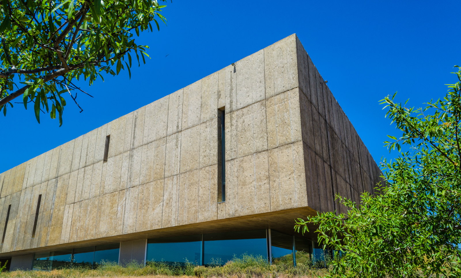 Vila_Nova_Foz_Coa_Museu_do_Coa